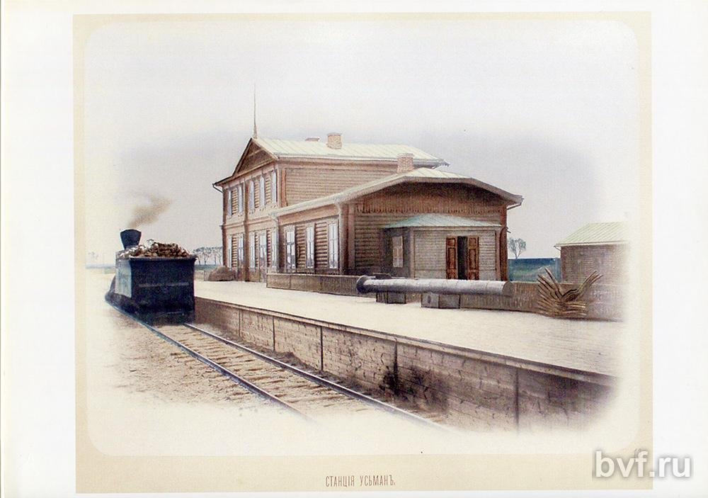 Станция Усмань